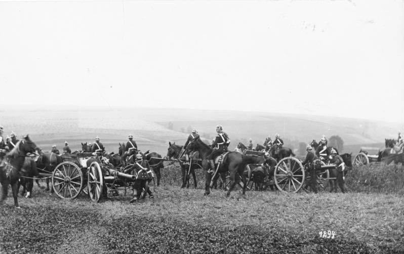 Stellungswechsel. Geschütze werden aufgeprotzt